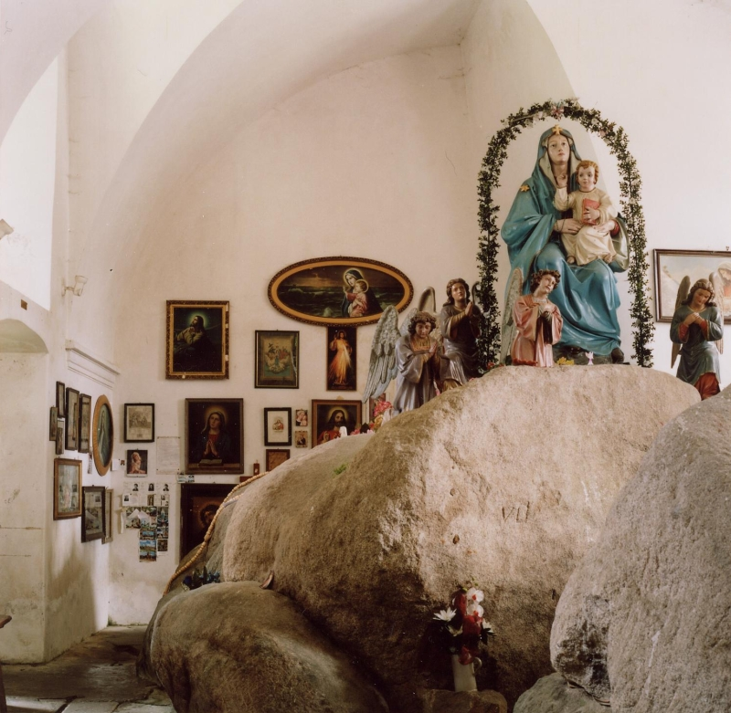 Heiliger Stein bei Maria Schnee